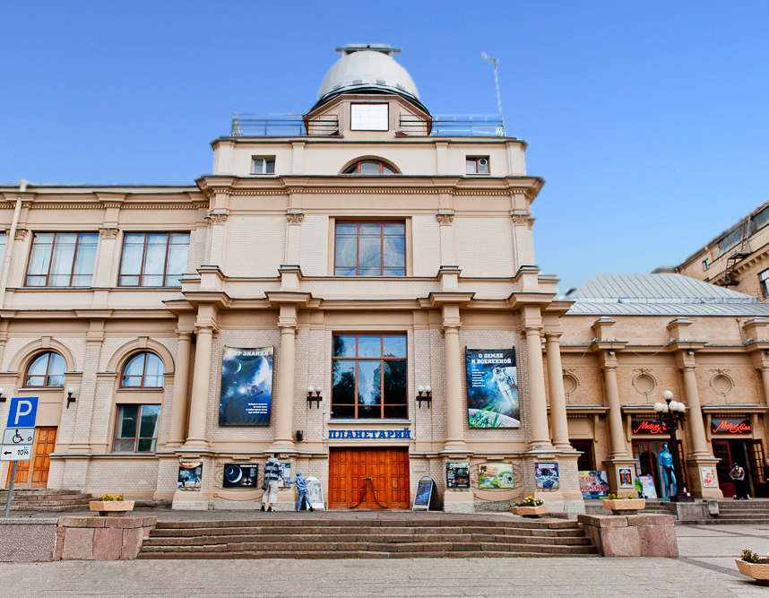 Санкт-Петербургский Планетарий